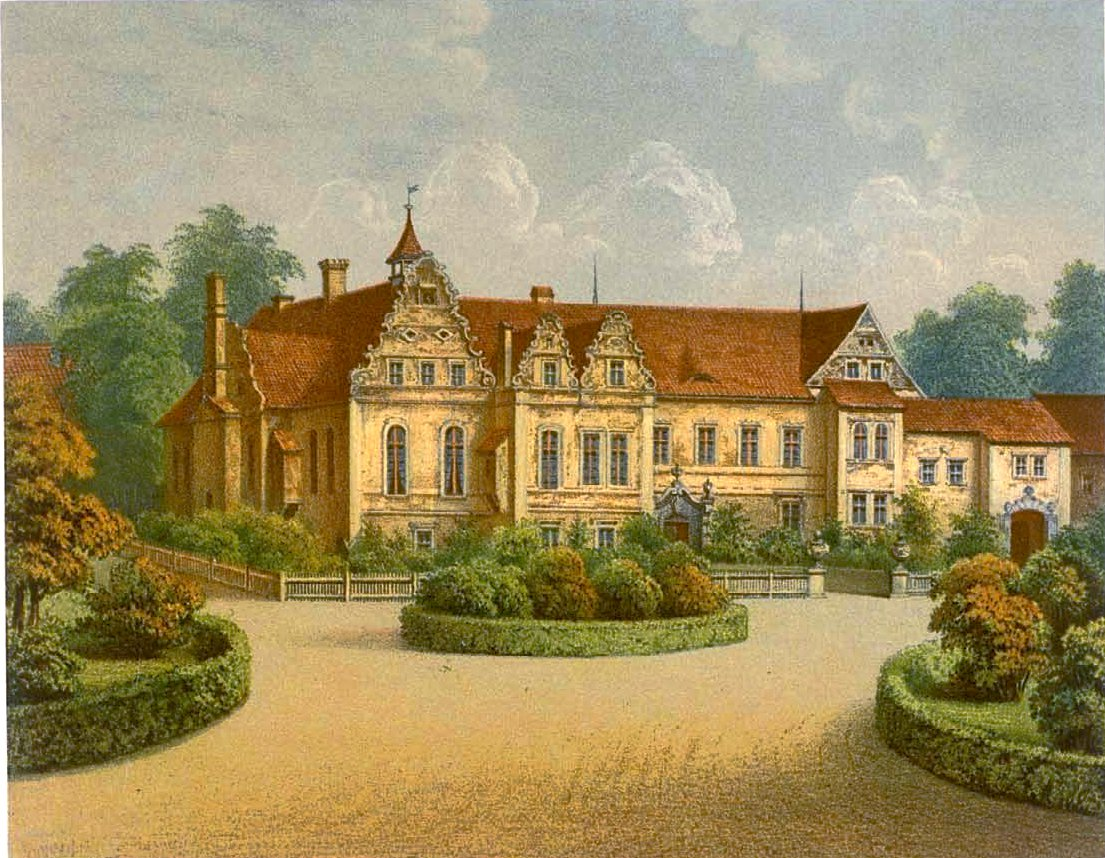 Schloss Alt Warthau, Kreis Bunzlau, Provinz Schlesien